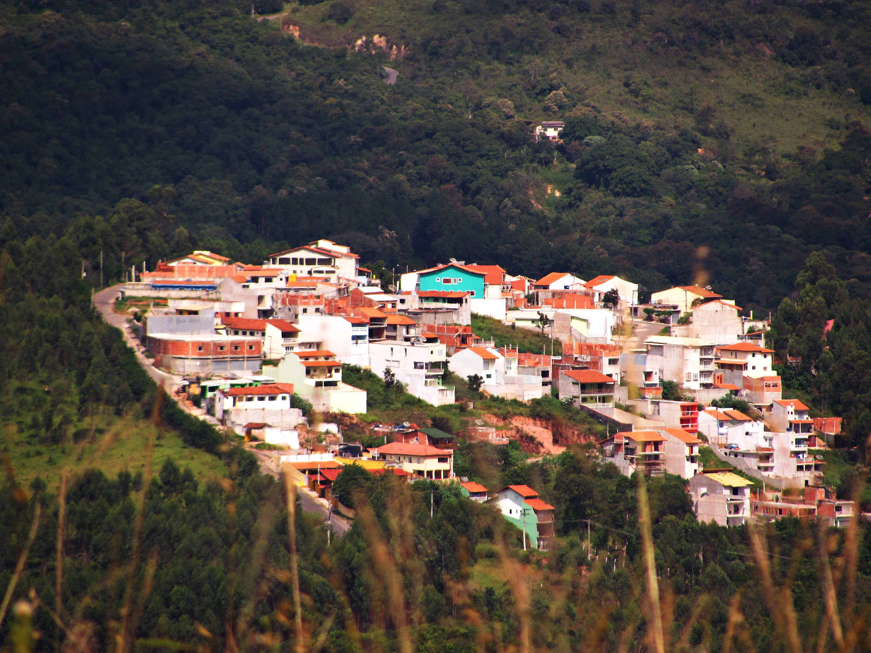 Bairro de Caieiras encravado na Serra da Cantareira localizado na região leste do Distrito de Laranjeiras.